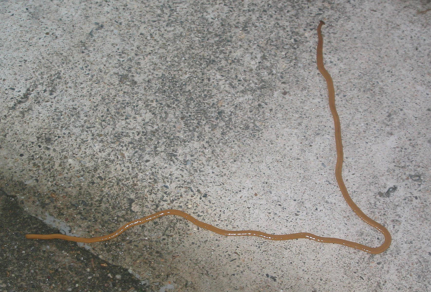 Bipalium nobile